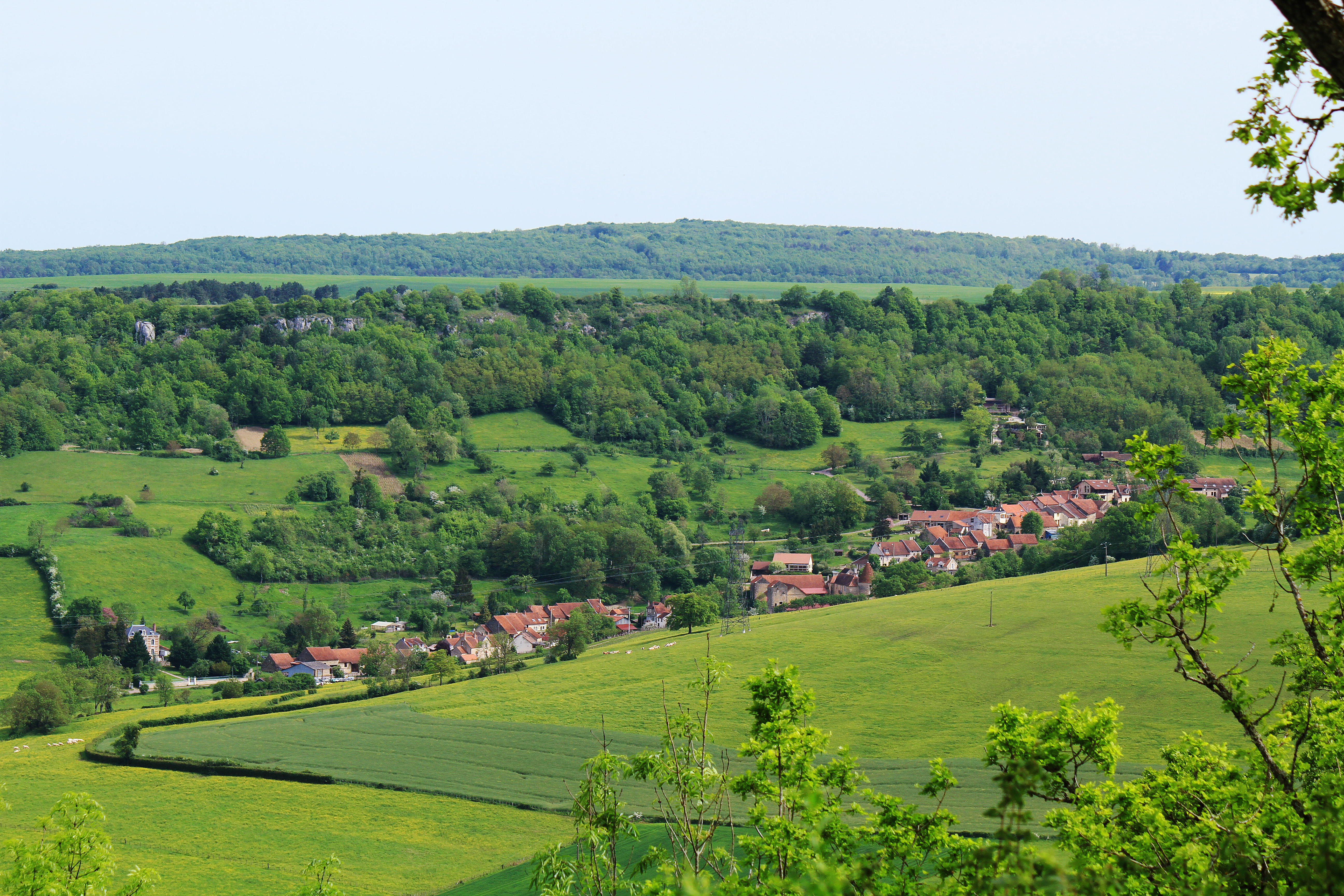 Villeferry vu de l'éperon barré d'Arnay-sous-Vitteaux